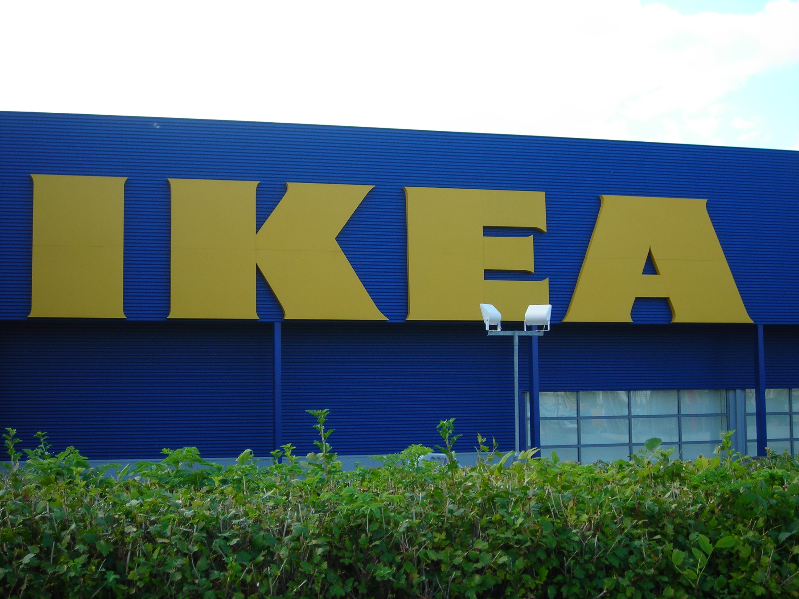 Ikea Västerås